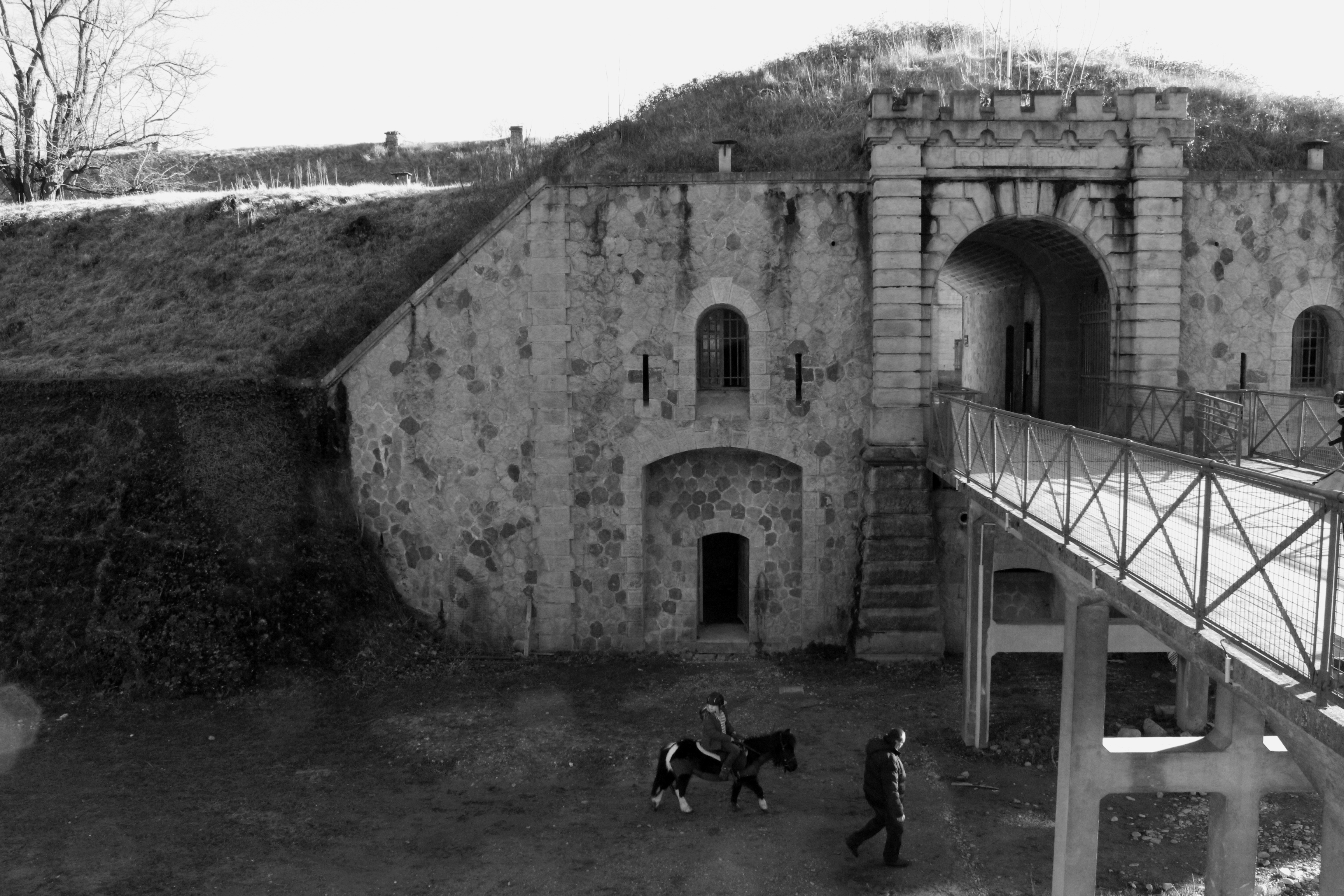 Le fort de Feyzin en 2014.